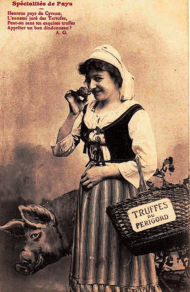 Périgueux truffes spécialité de pays